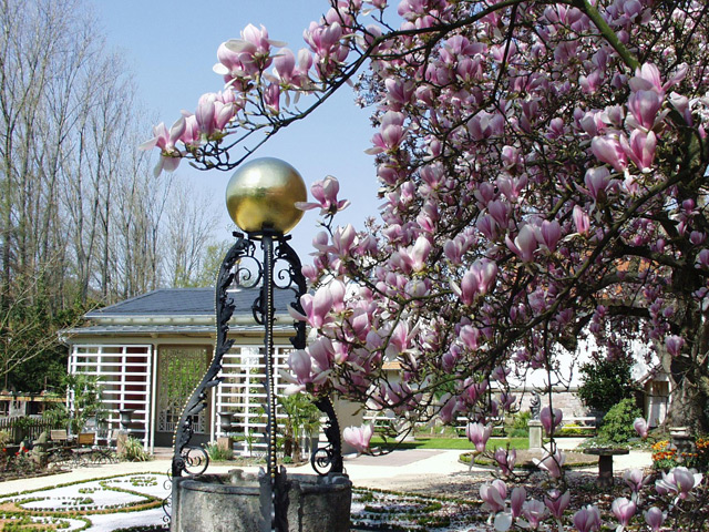 Katzscher Garten